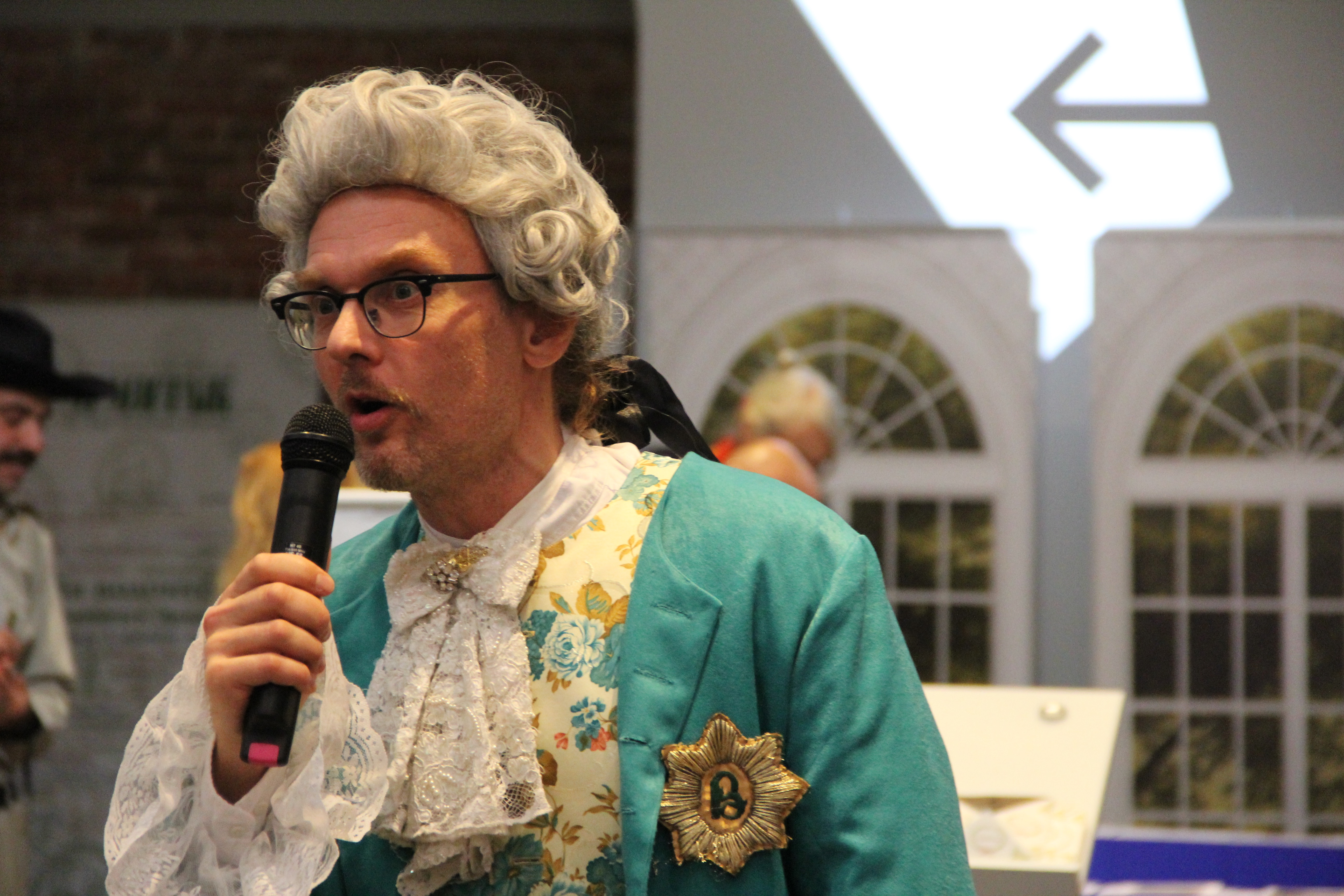 Billede af Mikael K., der stod for at oprette tjenesten i 2003. Billedet er fra 2018.